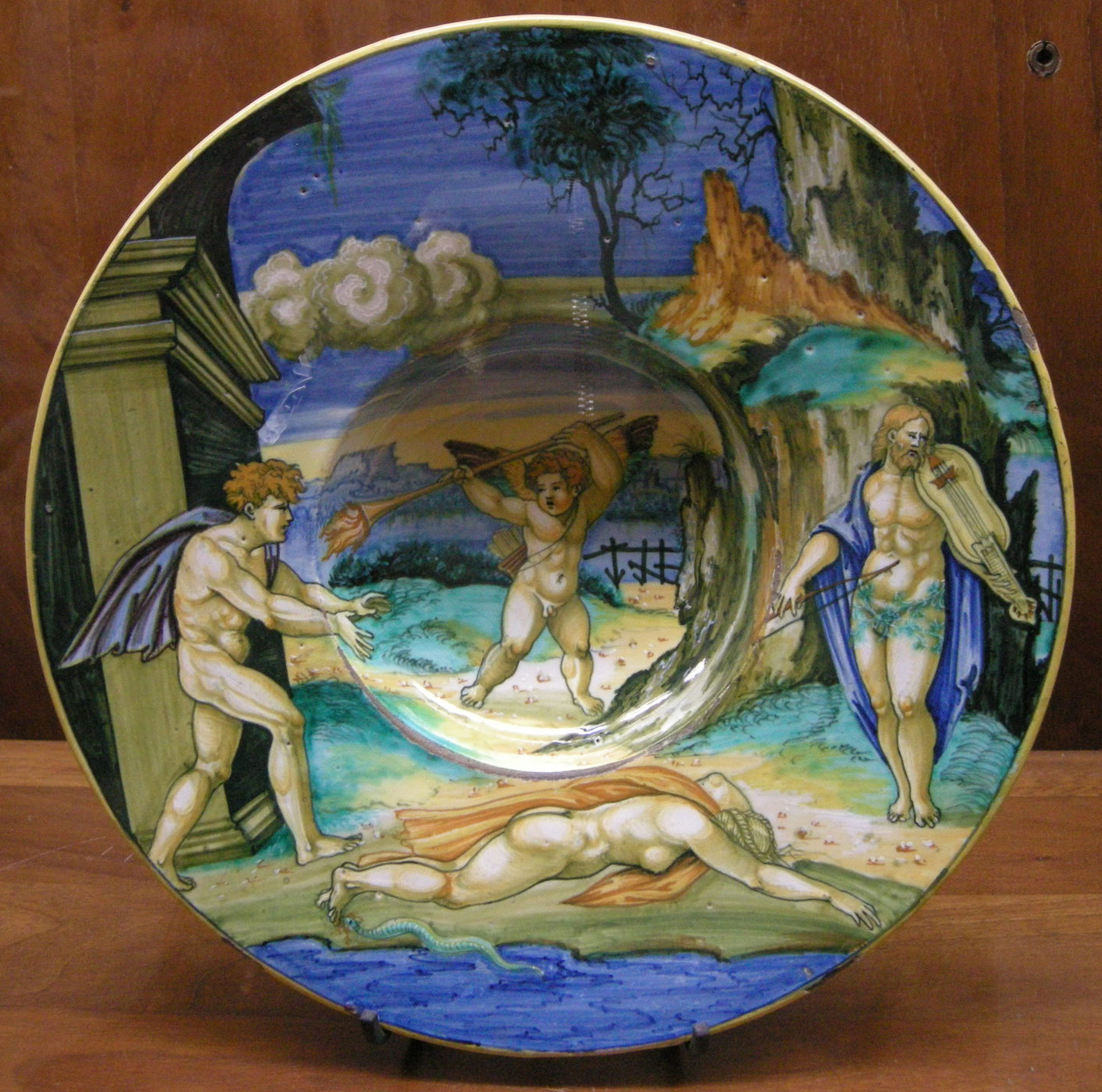 C.sf., urbino, francesco xanto avelli, coppa con euridice, aristeo e orfeo